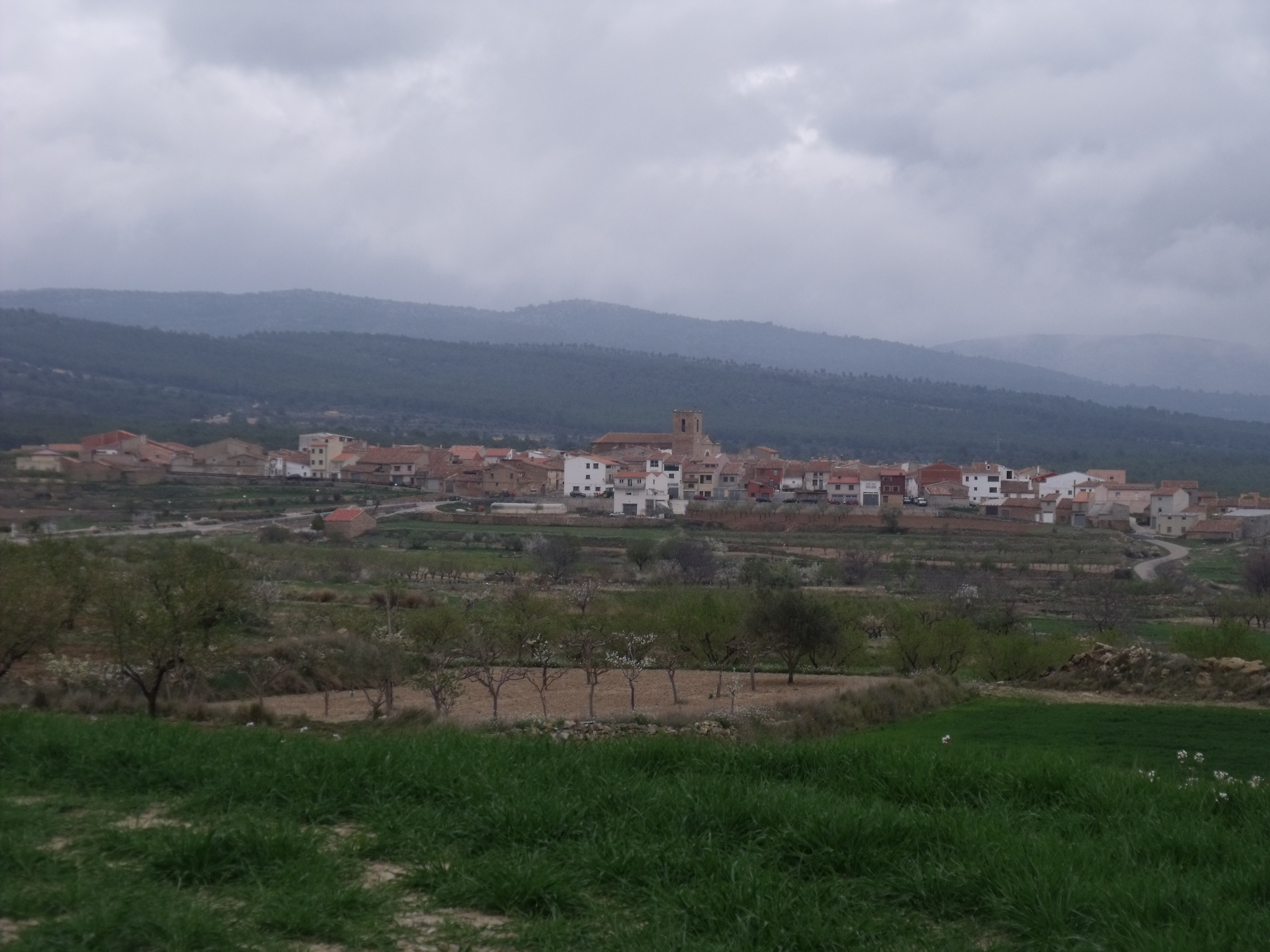 Vista general